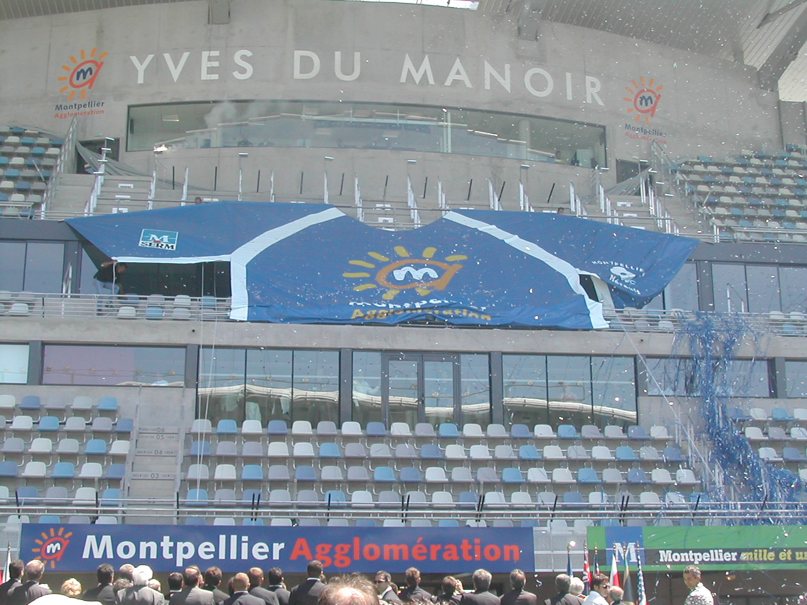 Maillot géant déployé pour l'inauguration